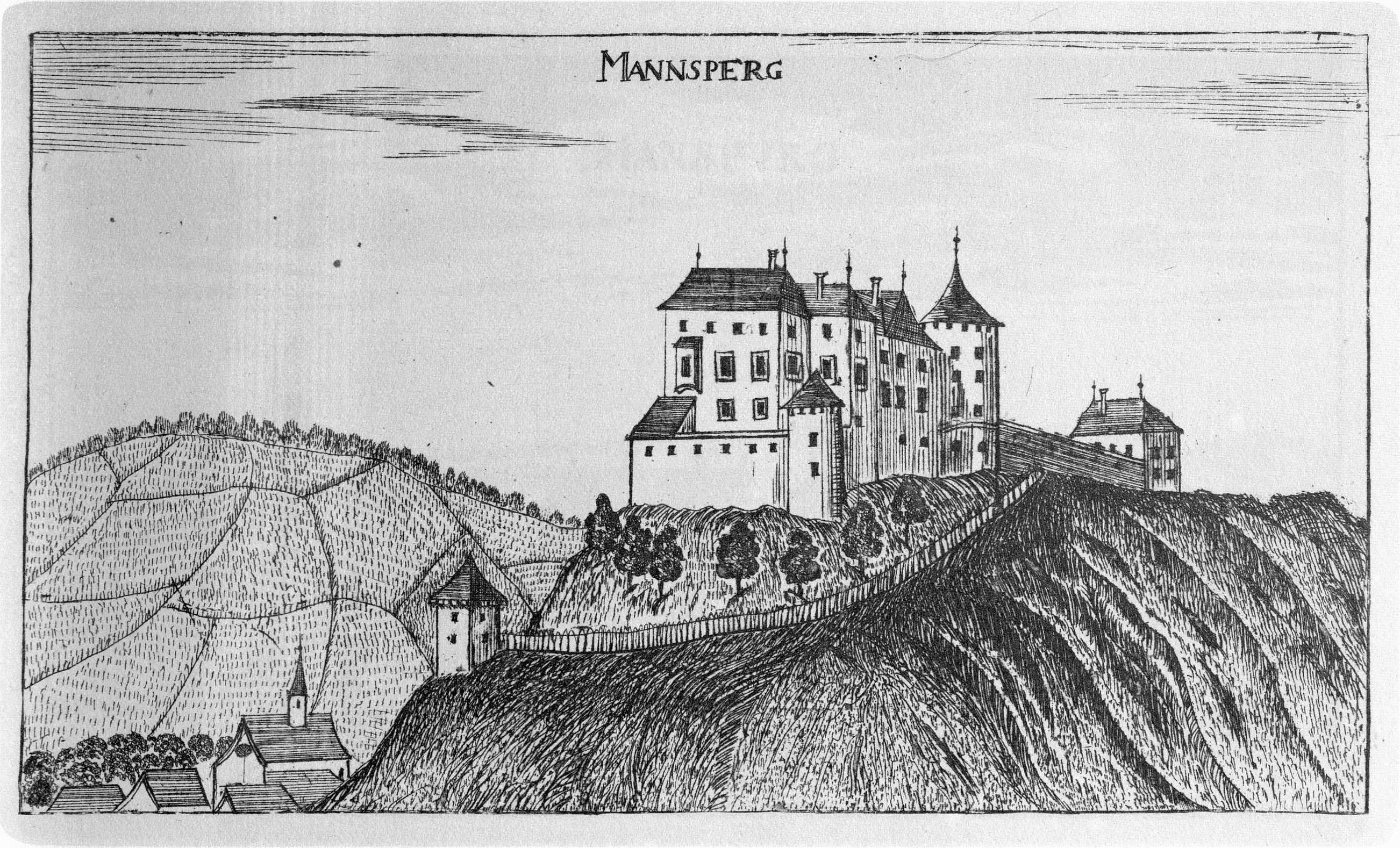 G. M. Vischers Käyserlichen Geographi, Topographia Ducatus Stiriae, Das ist: Eigentliche Delineation / und Abbildung aller Städte / Schlösser / Marcktfleck / Lustgärten / Probsteyen / Stiffter / Clöster und Kirchen / so es sich im Herzogthumb Steyrmarck befinden; Und anjetzo Umb einen billichen Preyß zu finden seynd Bey Johann Bitsch Universitäts Buchhandlern / Auff dem Juden=Platz bey der guldenen Saulen. Graz 1681 Die Nummerierung der Dateien folgt der alphabetischen Reihung der Ortsnamen